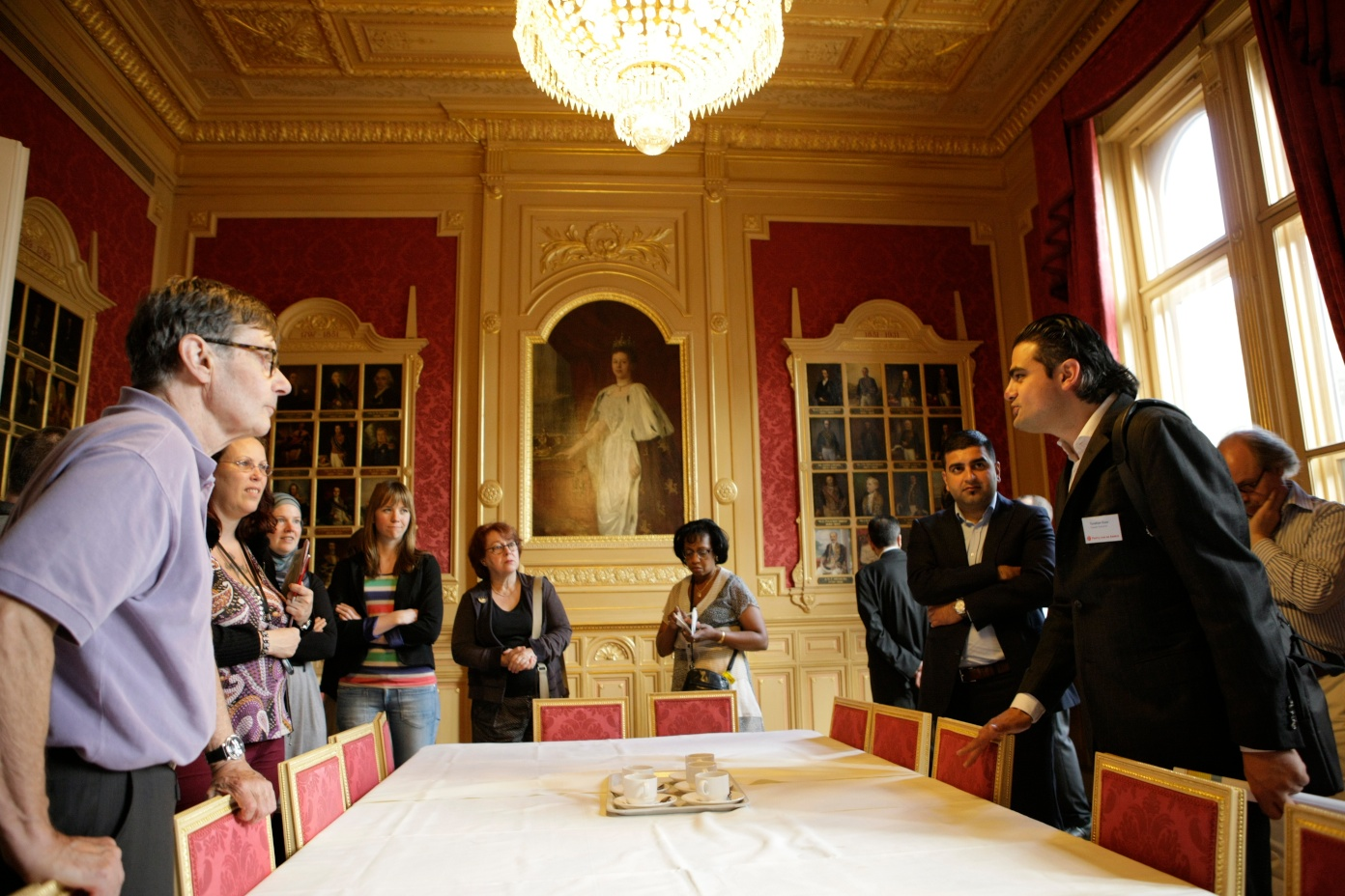 15 juni 2013, Den Haag. Deze zaterdag verwelkomden we zo'n duizend leden in de Tweede Kamer voor de jaarlijkse PvdA-ledendag. Ze werden welkom geheten door Hans Spekman, rondgeleid door Tweede Kamerleden en mochten plaatsnemen in de grote plenaire vergaderzaal en in de PvdA-fractiekamer. Ook was er gelegenheid om vragen te stellen aan Diederik Samsom. Foto: Lex Draijer.